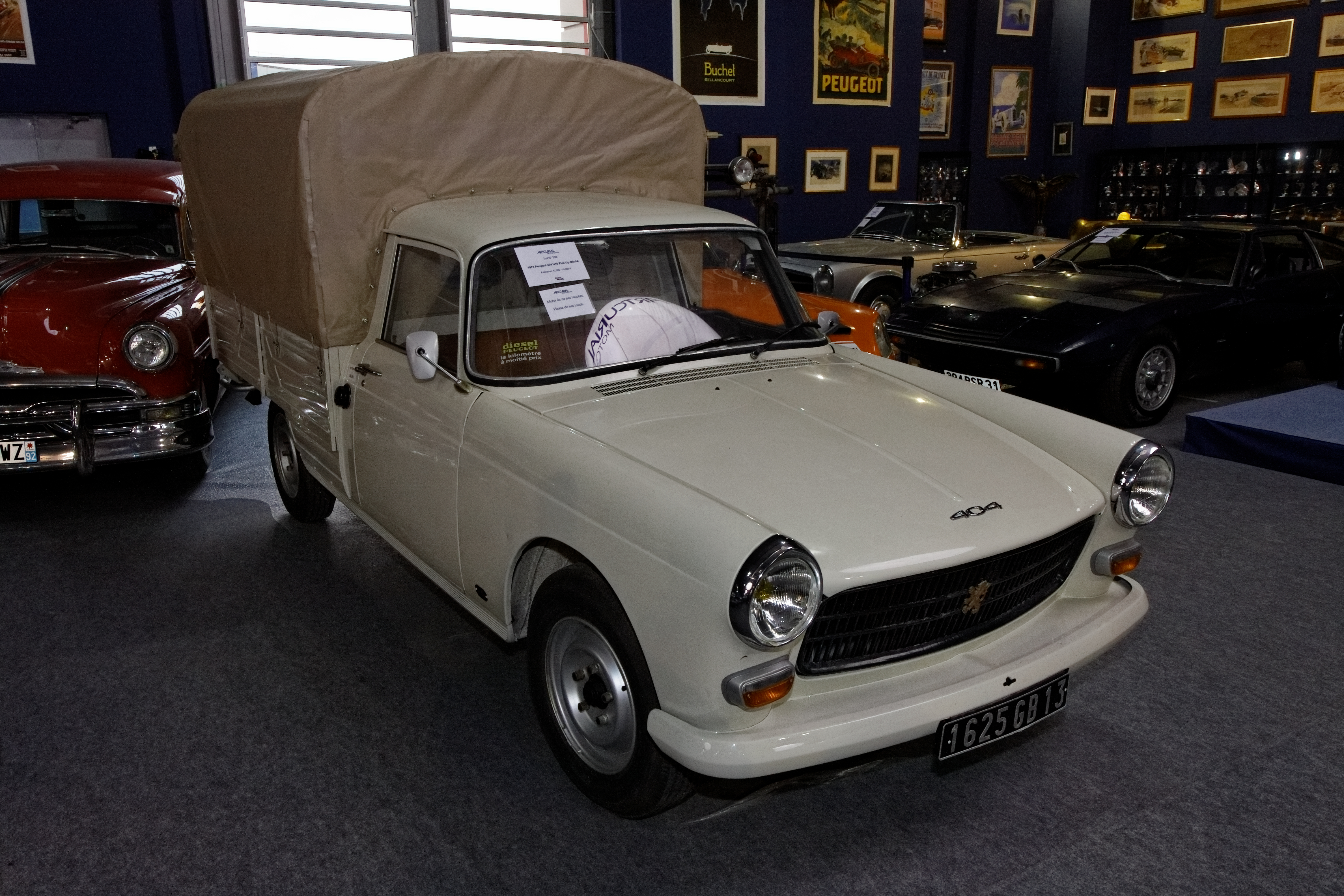 Peugeot 404 Pick-up bâché